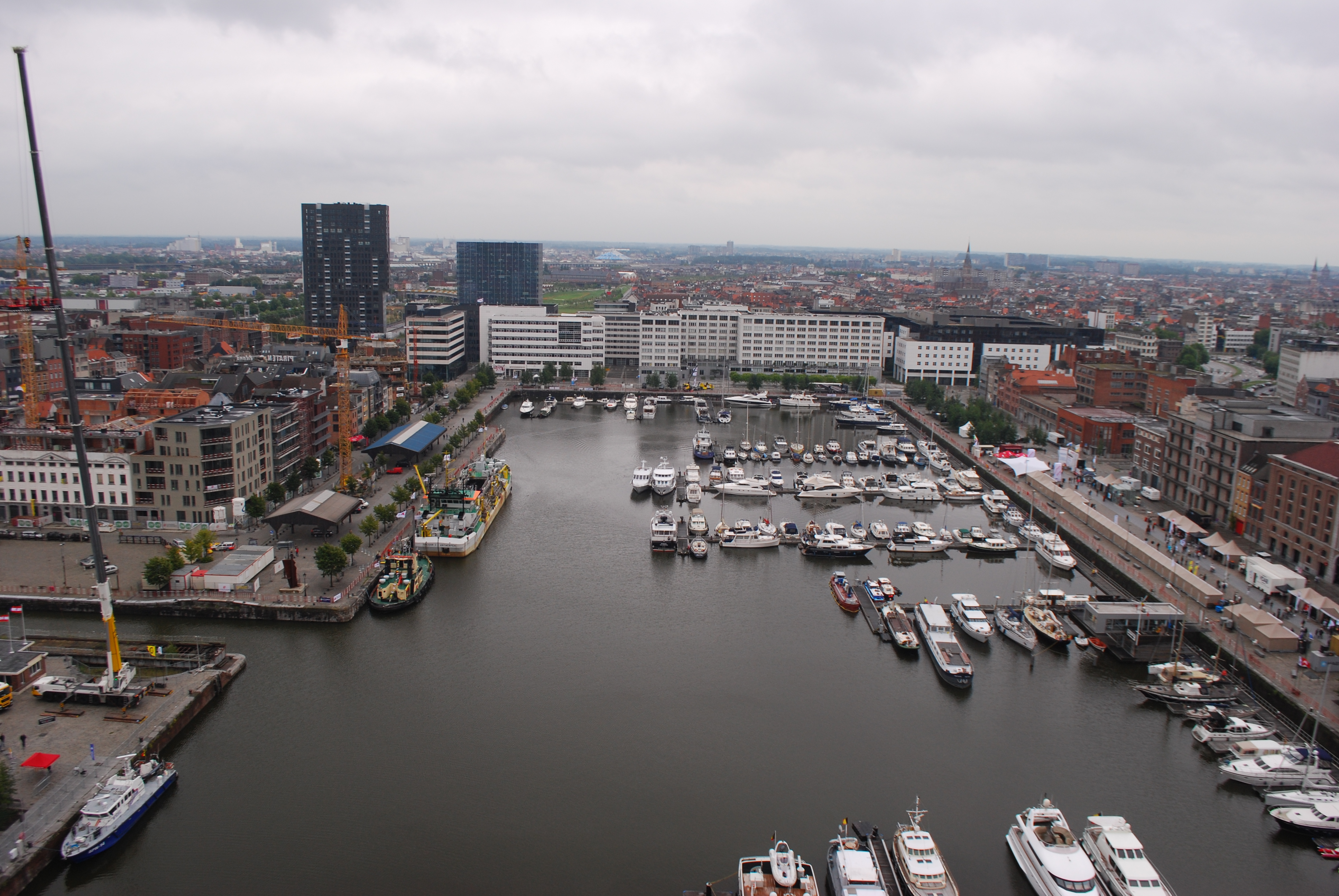 Vue sur le Willemdok à Anvers.